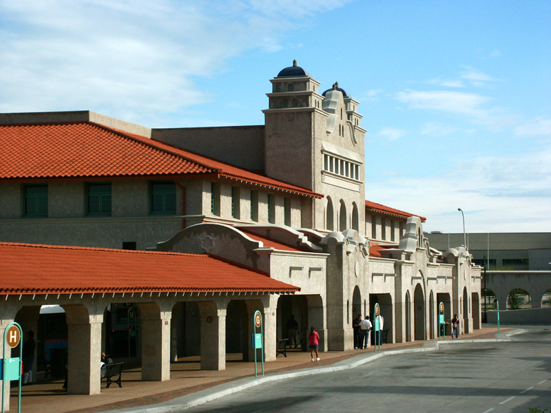 Alvarado Transportation Center, Albuquerque, New Mexico. Photo by camerafiend.